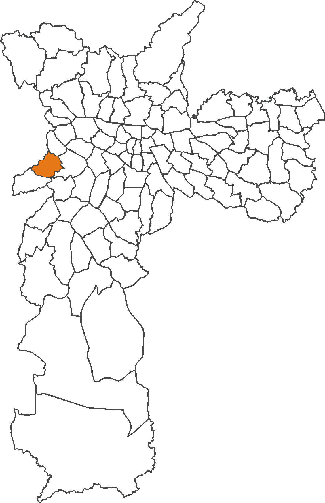 Localização do distrito do Rio Pequeno no município de São Paulo.